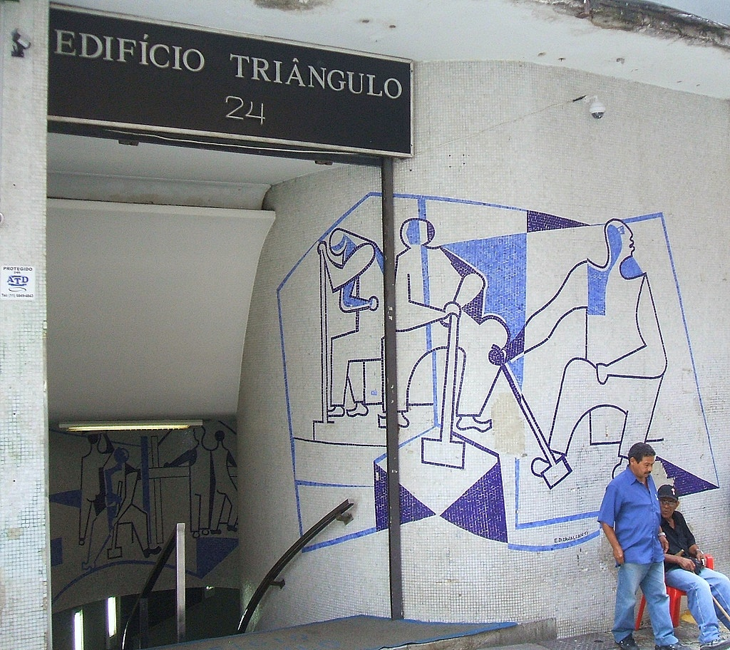 Edifício Triângulo, projeto de Oscar Niemeyer (1955); mural de Di Cavalcanti na fachada. Rua José Bonifácio, 24, no centro da cidade de São Paulo, Brasil.